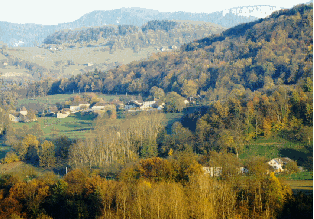 VOISSANT